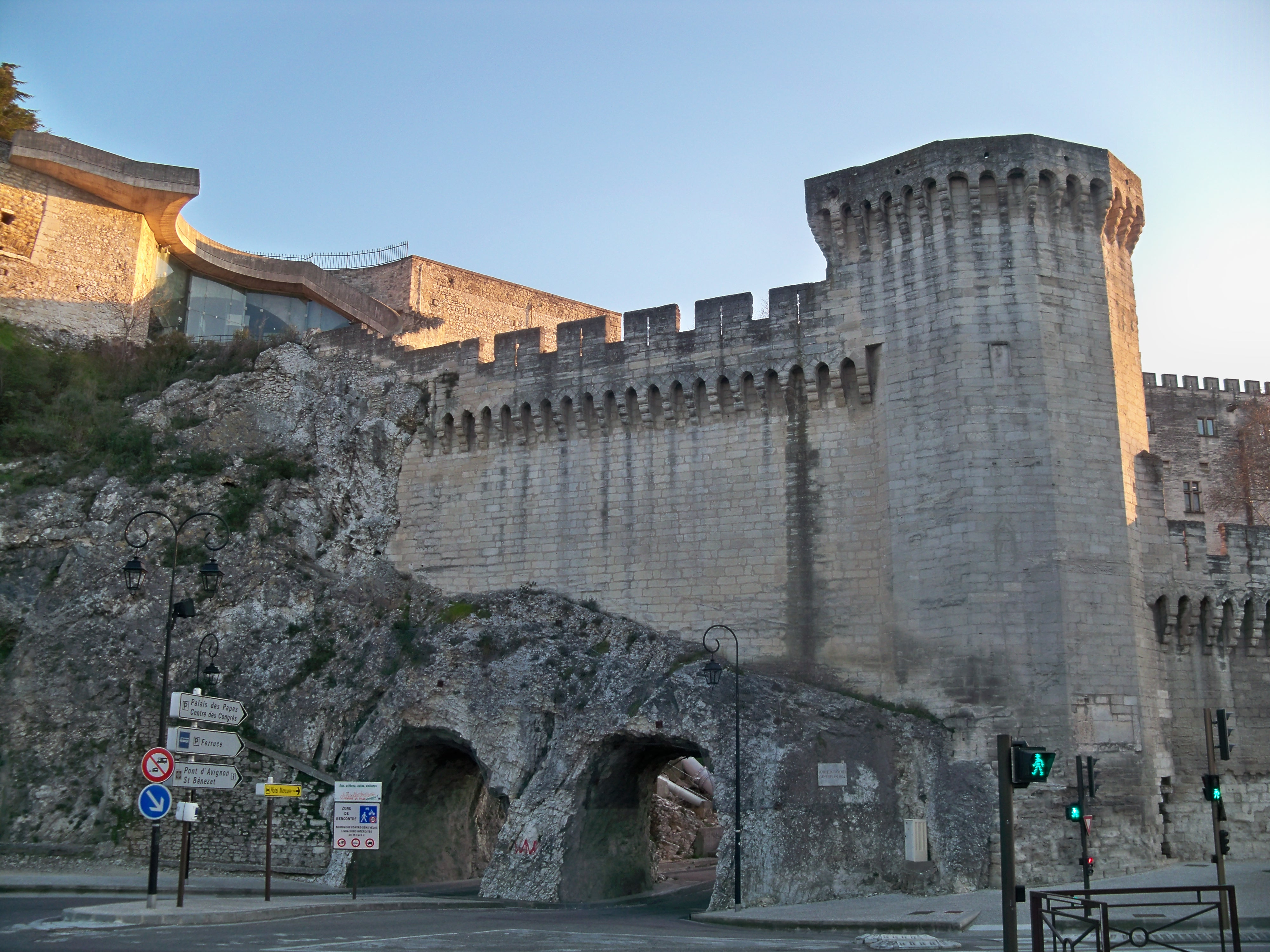 Porte du rocher des remparts d'Avignon, Vaucluse, France